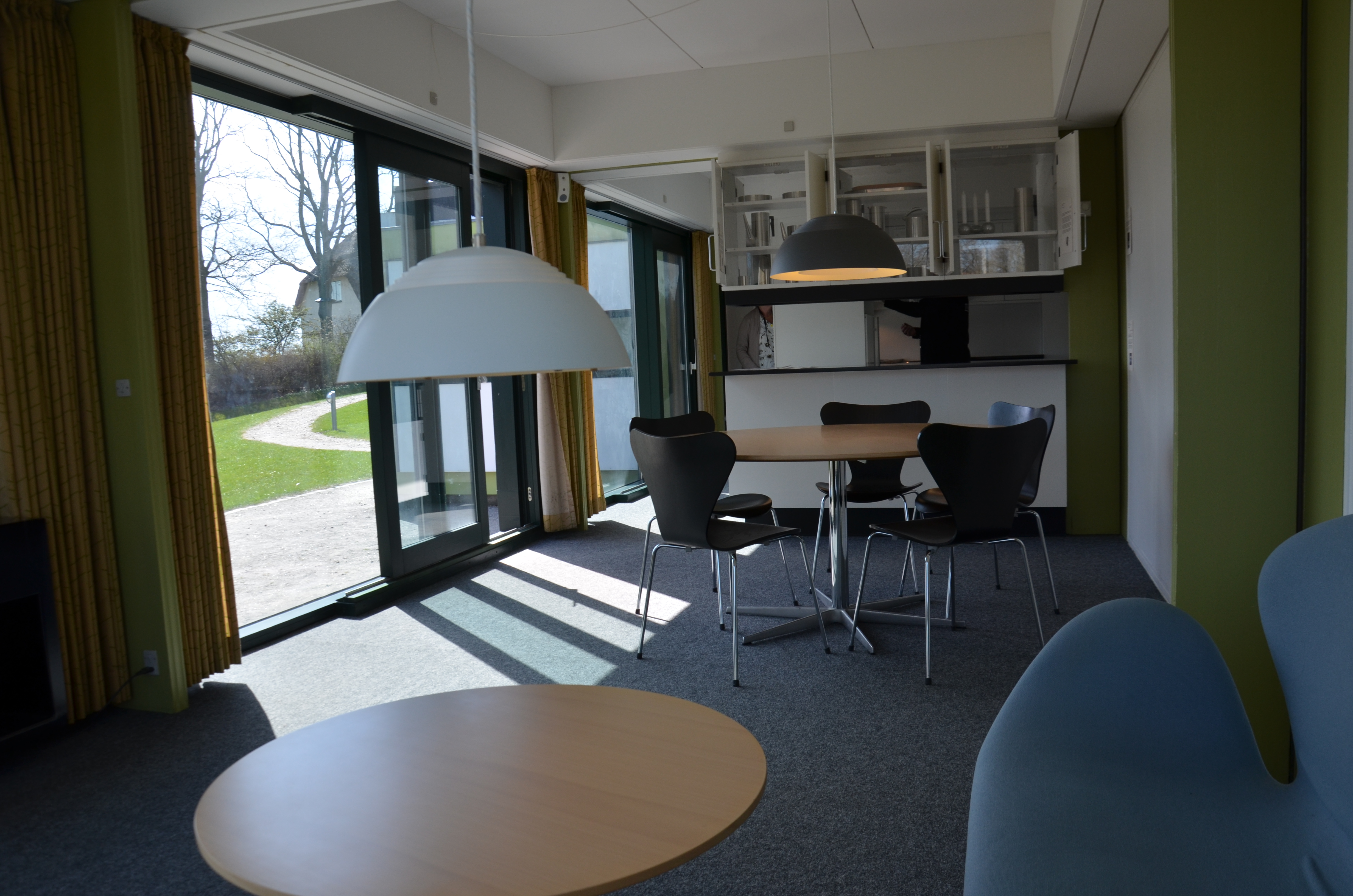 Arne Jacobsen's Kubeflex, interior